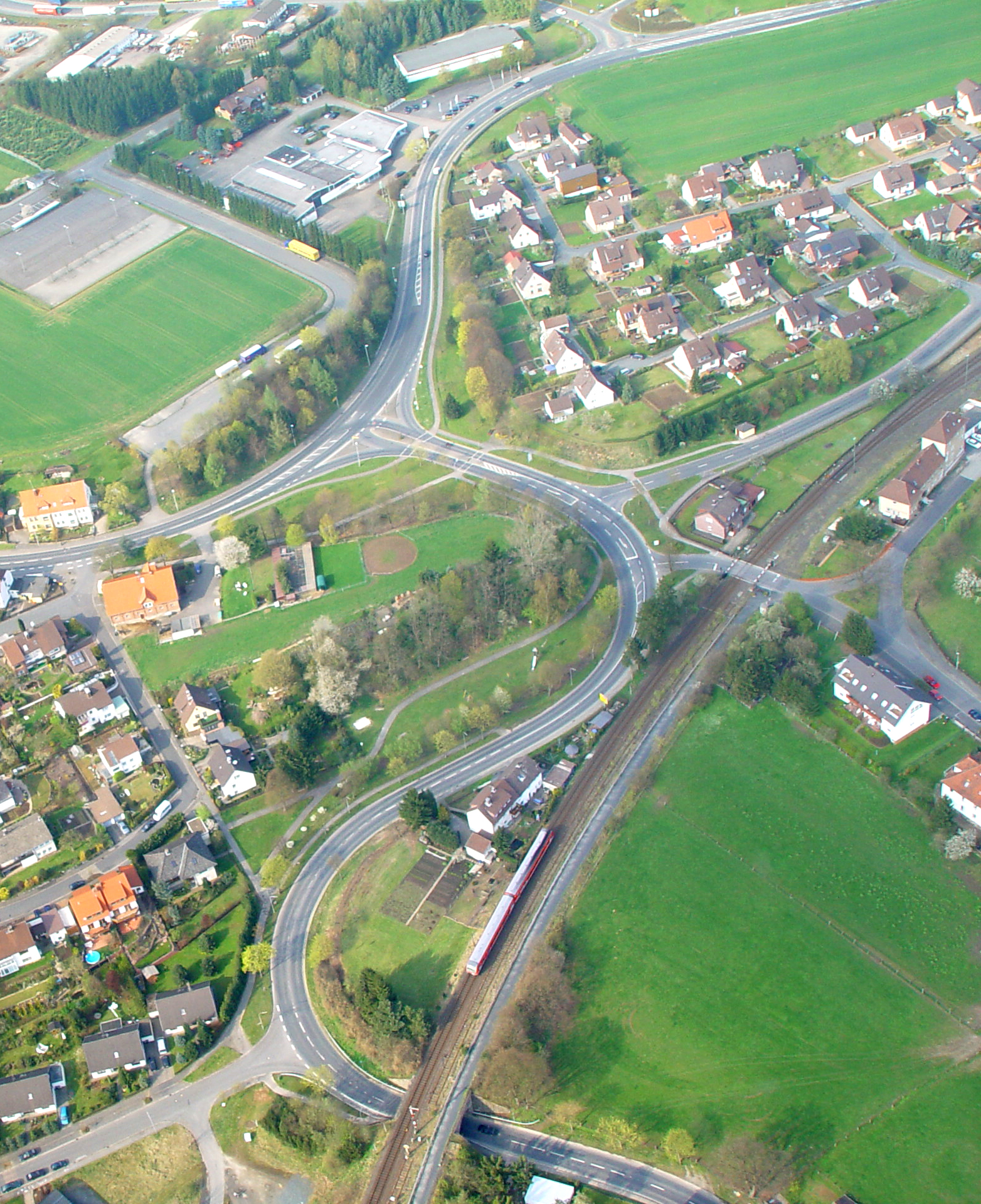 B 241, L 554, Solling-Bahn und ehemalige Bahnstrecke Uslar-Schönhagen am Ortsrand von Allershausen (Uslar).